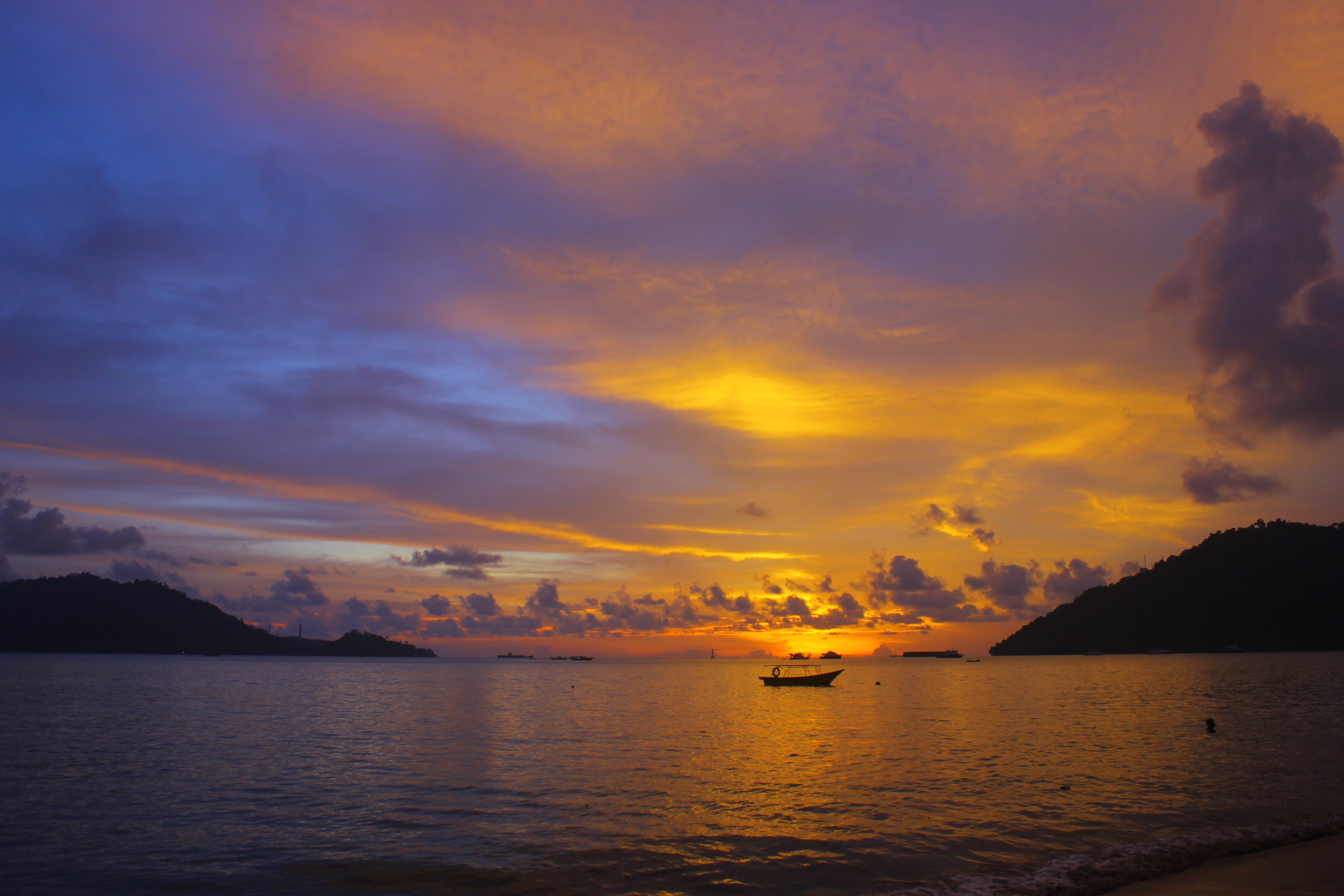 Senja dipantai Carolina, Kota Padang